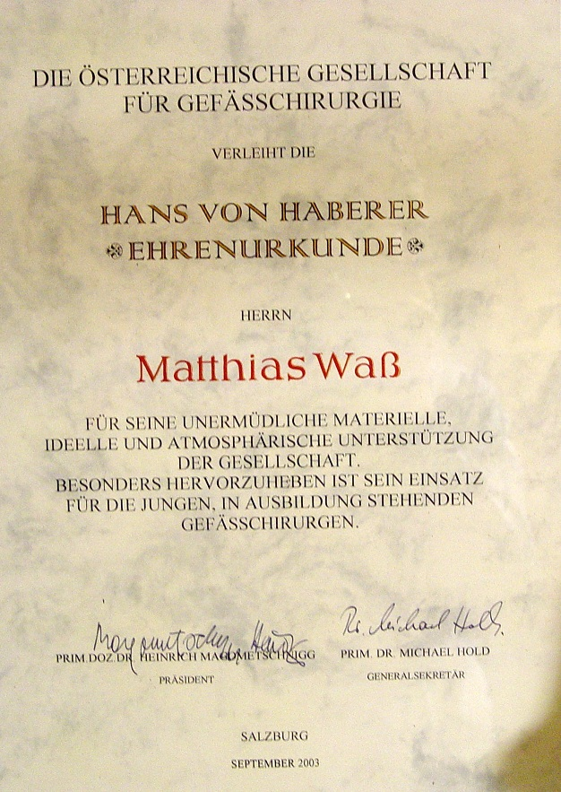 Hans von Haberer Ehrenurkunde, verliehen von der Österreichischen Gesellschaft für Gefäßchirurgie.